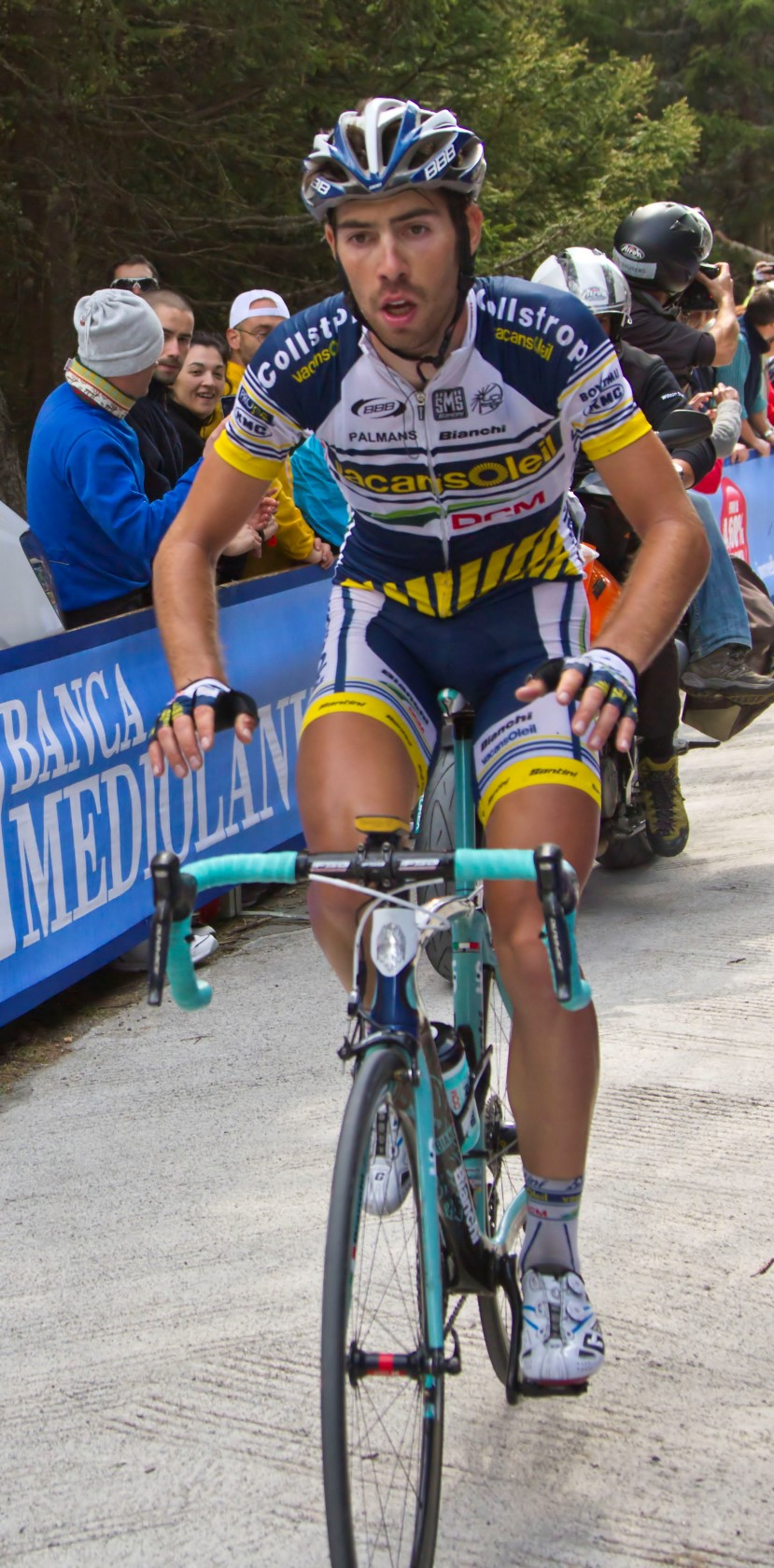 mortirolo 030 de gendt